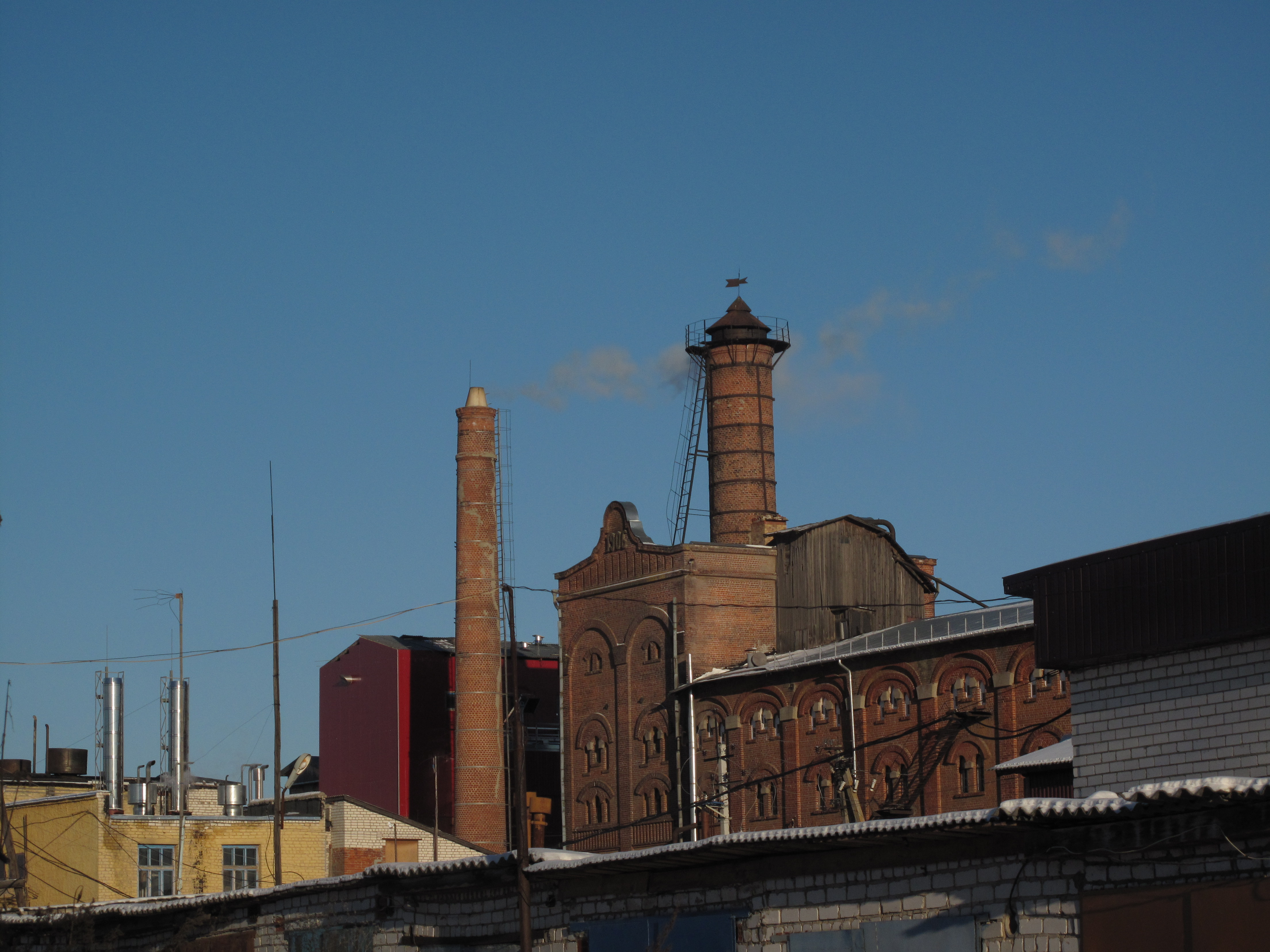 здание солодовни (Нижегородская область, Лысково, улица Мичурина)